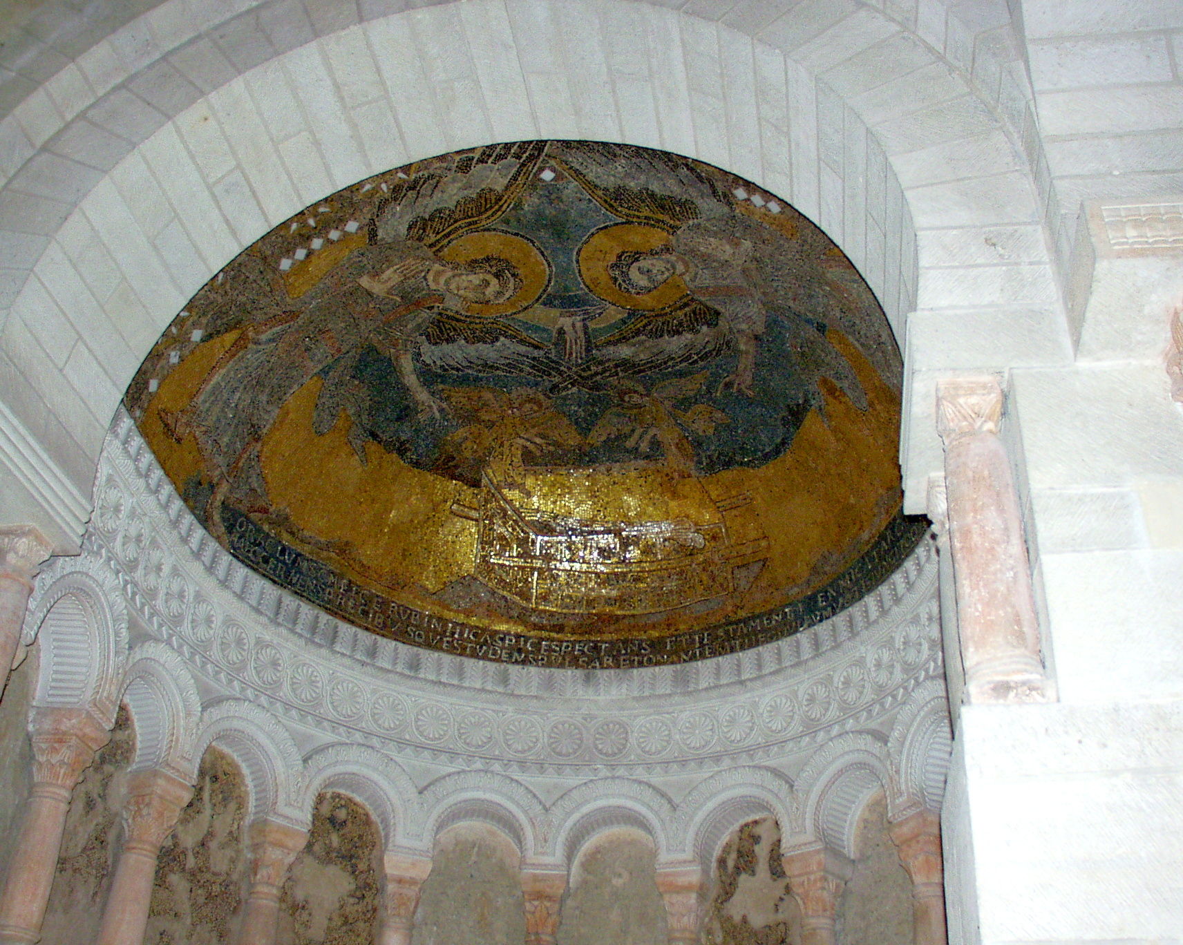 Germigny_mosaïque